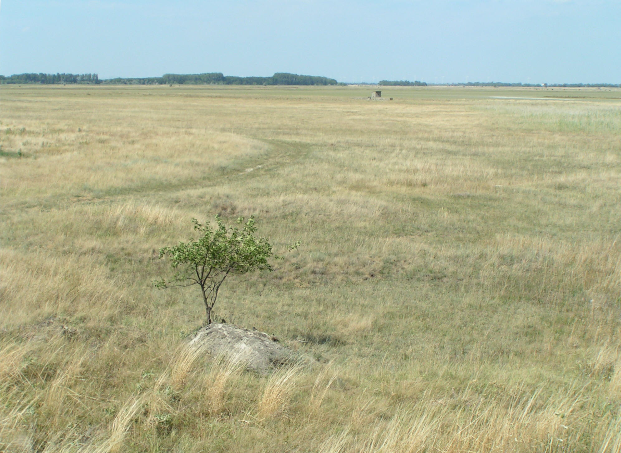 Pusztalandschaft bei der Langen Lacke im Seewinkel (Burgenland/Österreich)